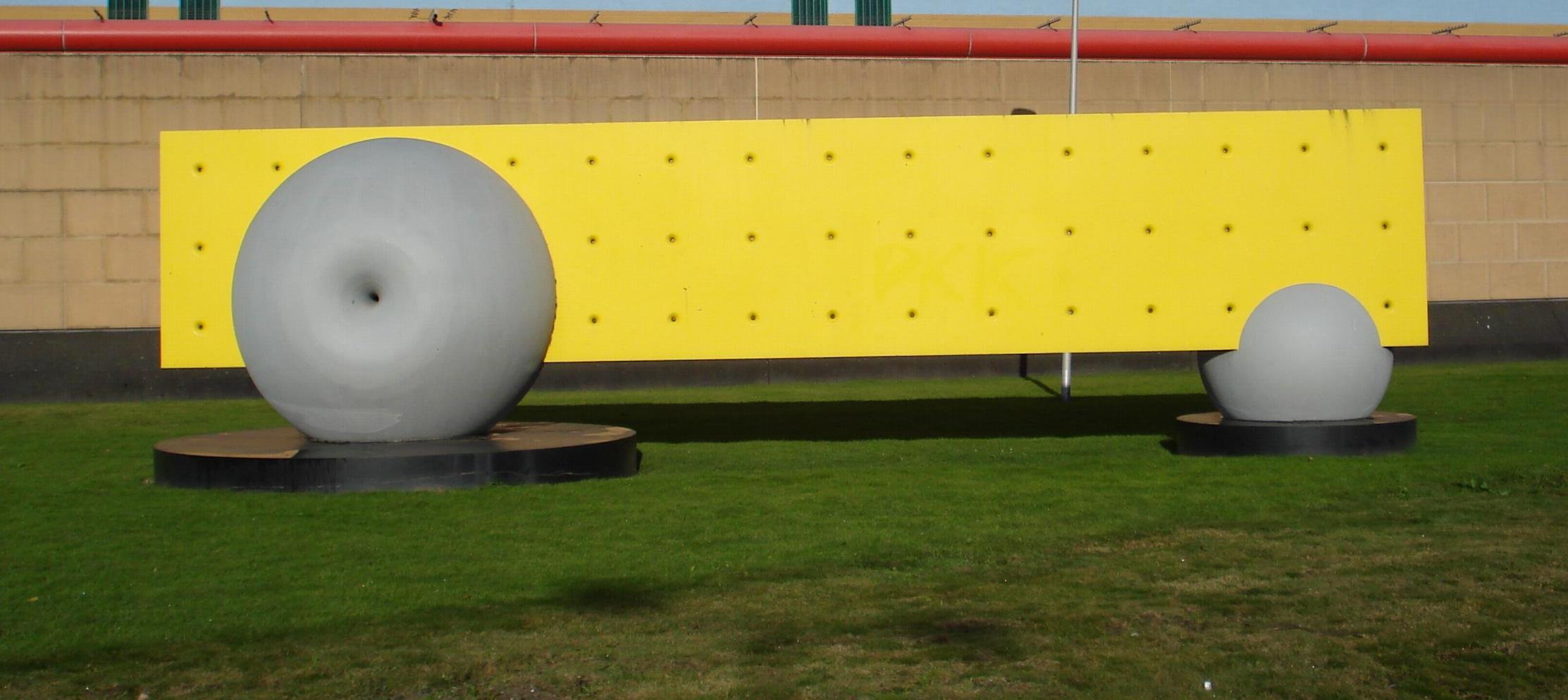 Rotterdam, Blijdorp, van Stolkweg. Kunstwerk "Gevangenis sculptuur" van Alfred Eikelenboom. Rotterdam/The Netherlands.